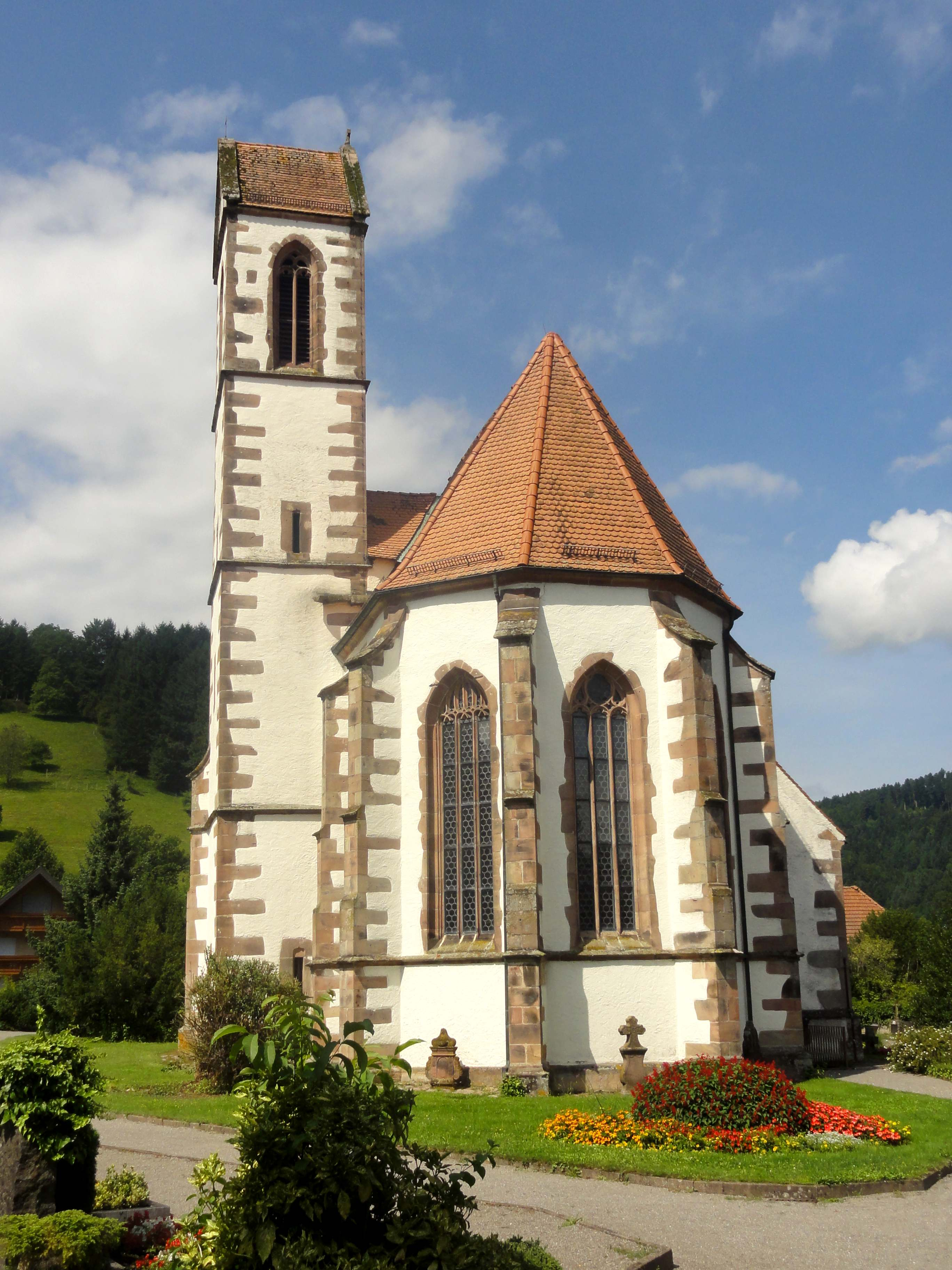 Dorfkirche Hausach - Beschreibung siehe Dateititel.